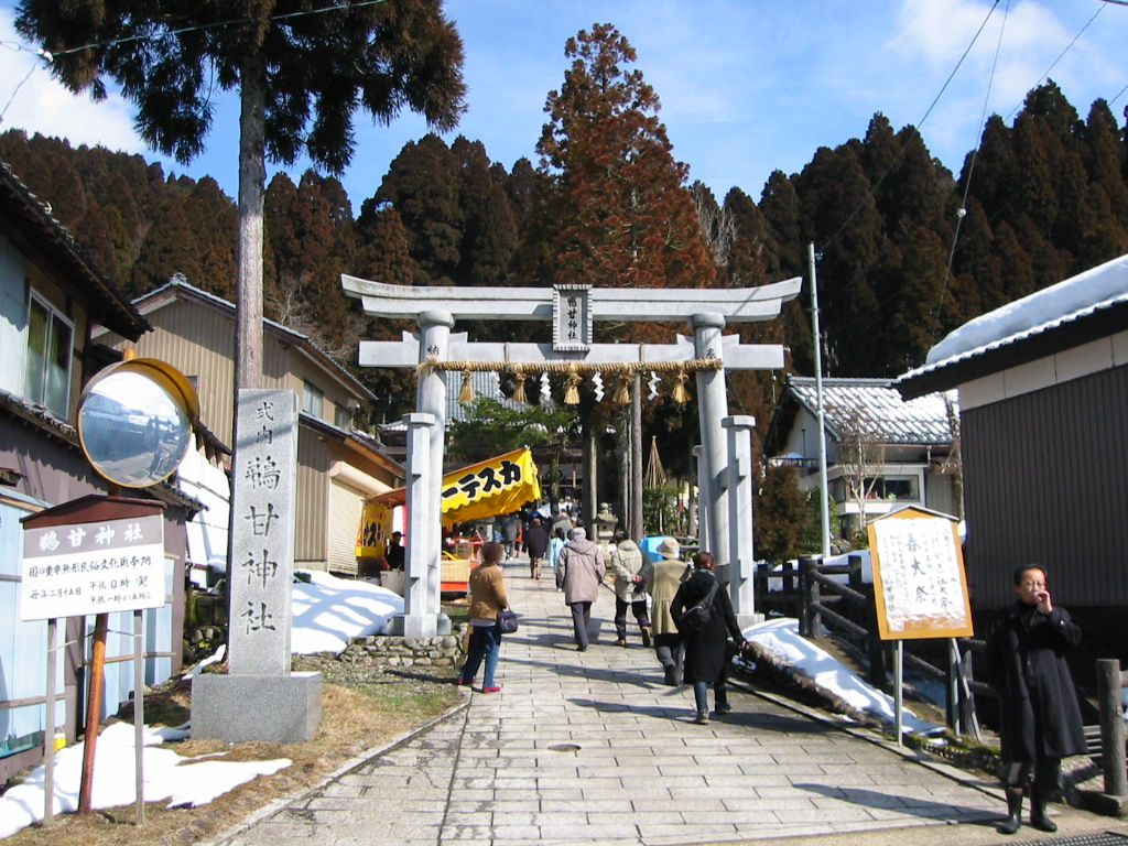 奉納神事は水海鵜甘神社で行われる